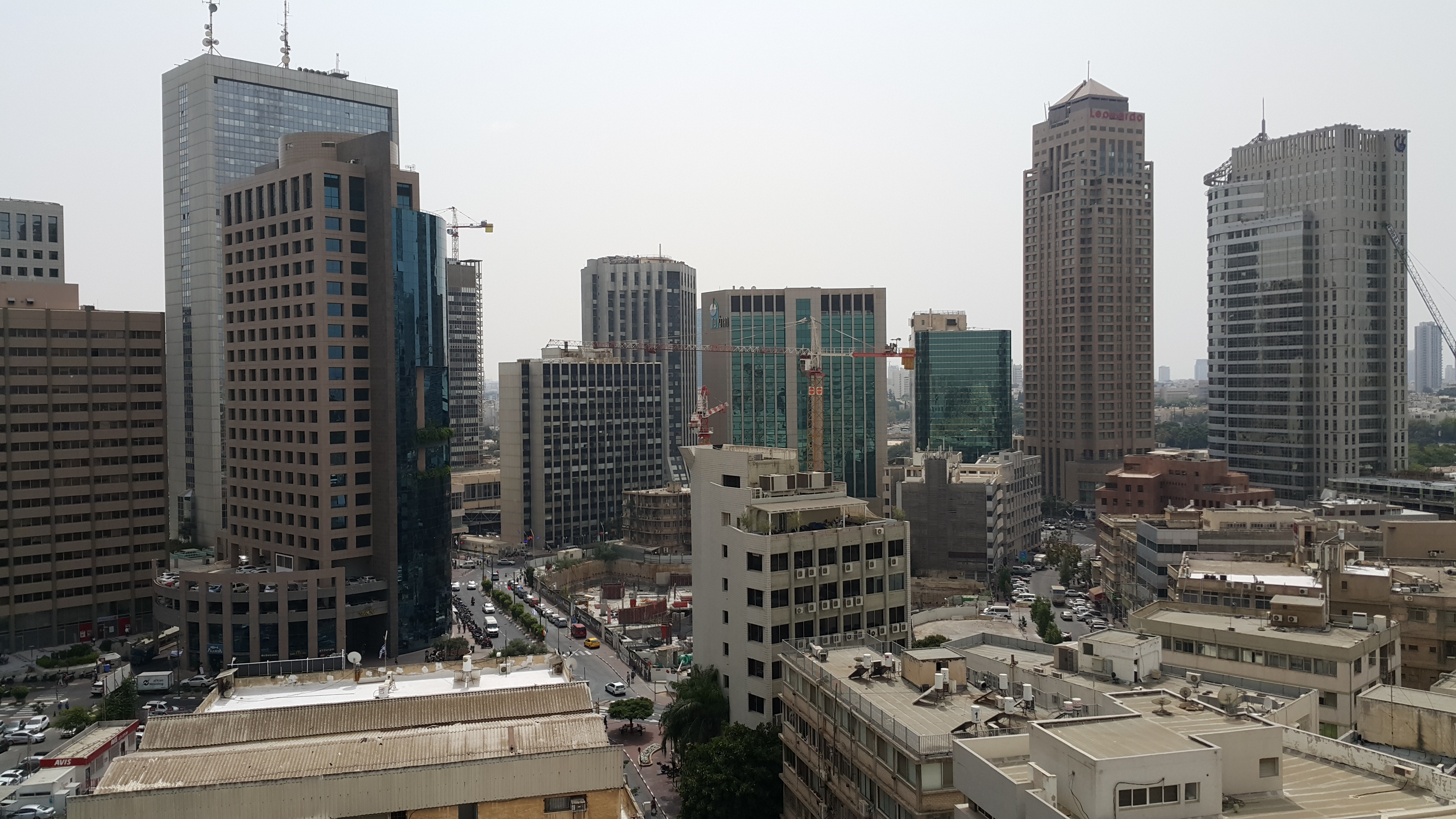 מתחם הבורסה ברמת גן מכיוון צפון